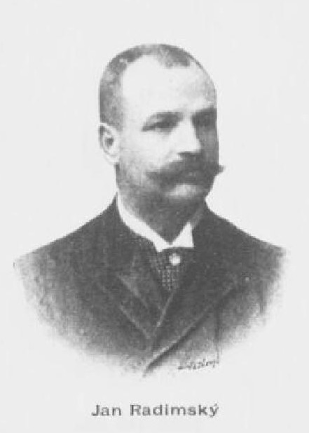 Jan Radimský (1840-1903), český šlechtic a politik, poslanec Českého zemského sněmu a Říšské rady.